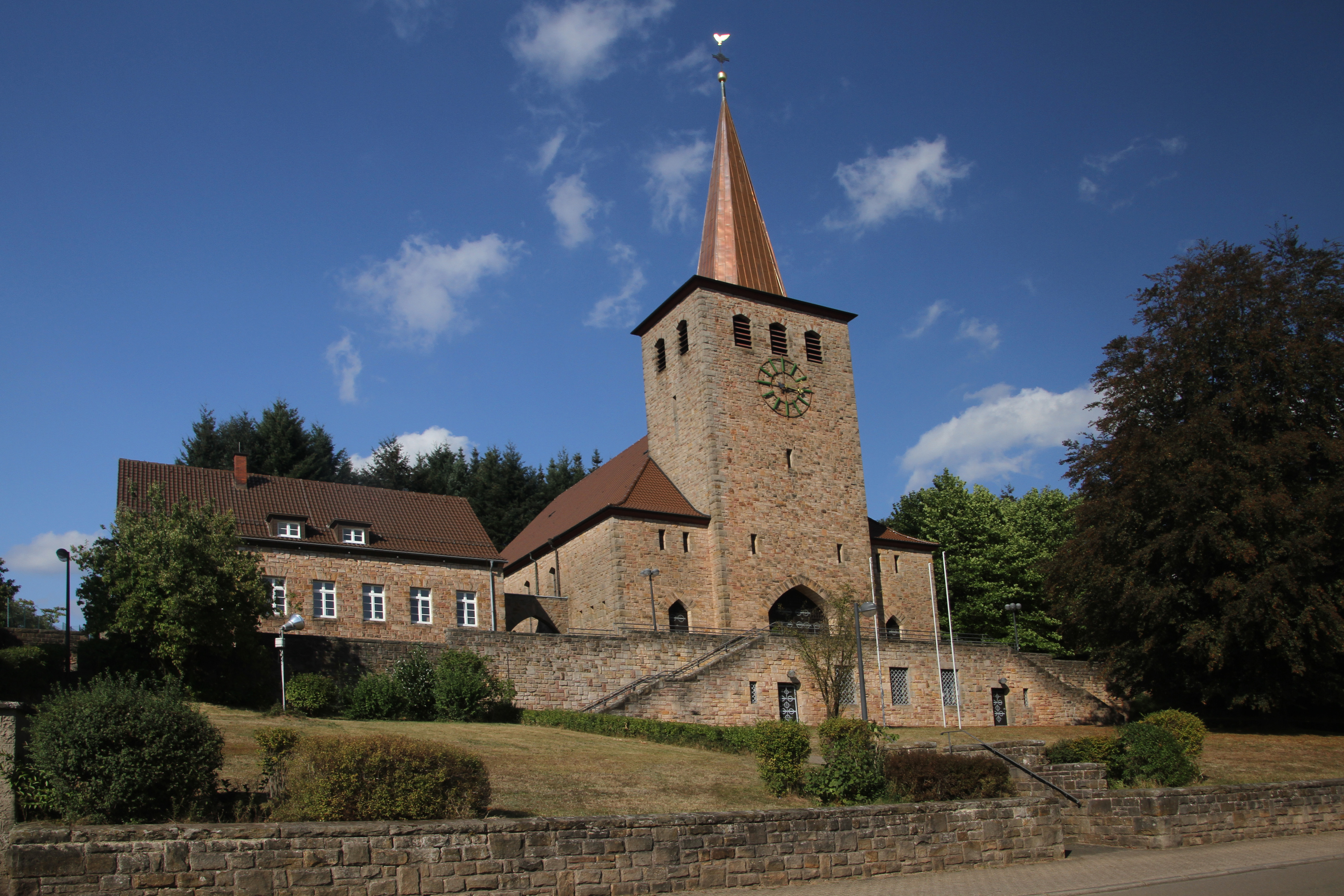 Kirche St. Katharina in Leimen (Pfalz)